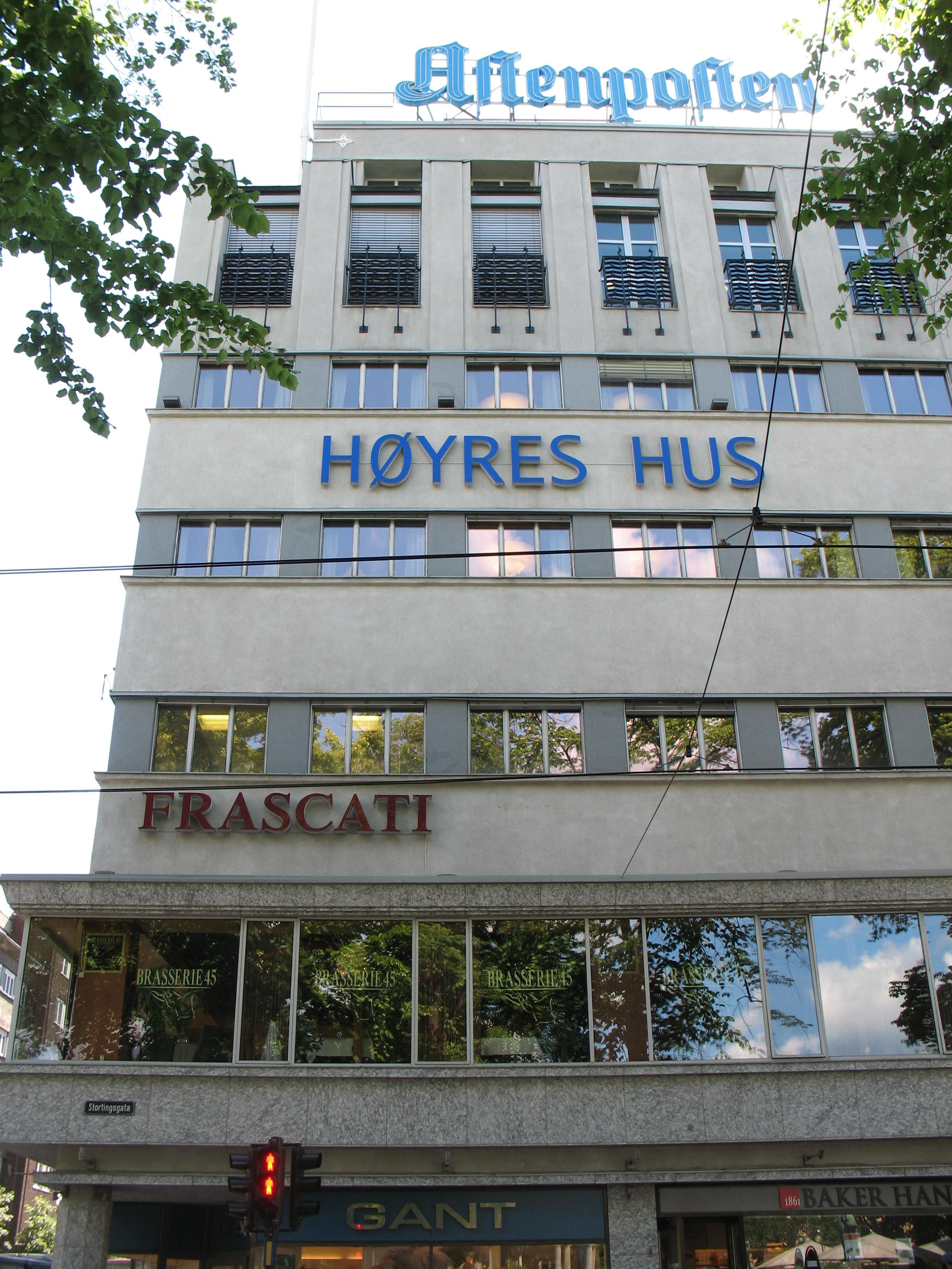 Høyres Hus i Stortingsgata 20 i Oslo